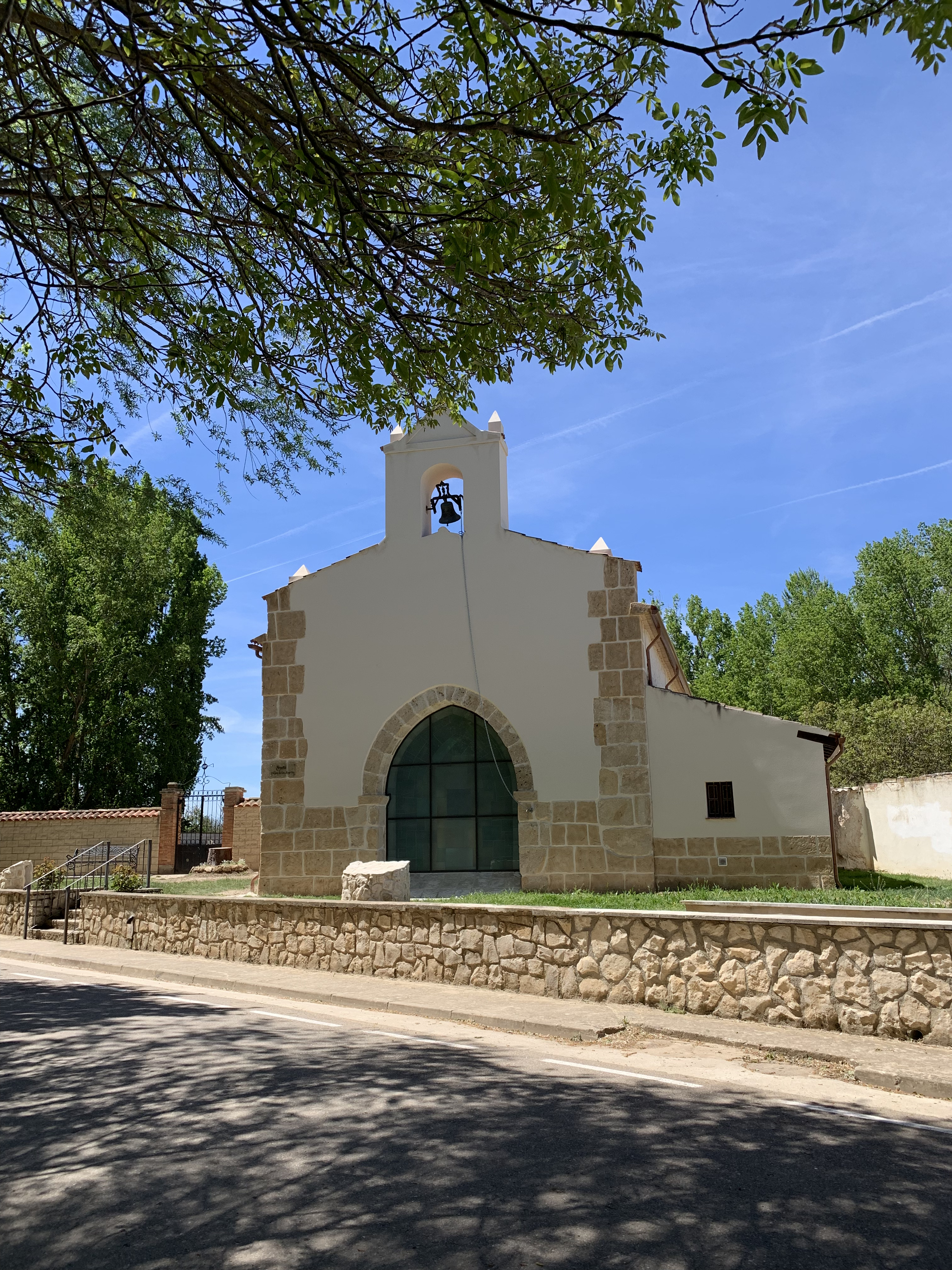 Berlangas de Roa